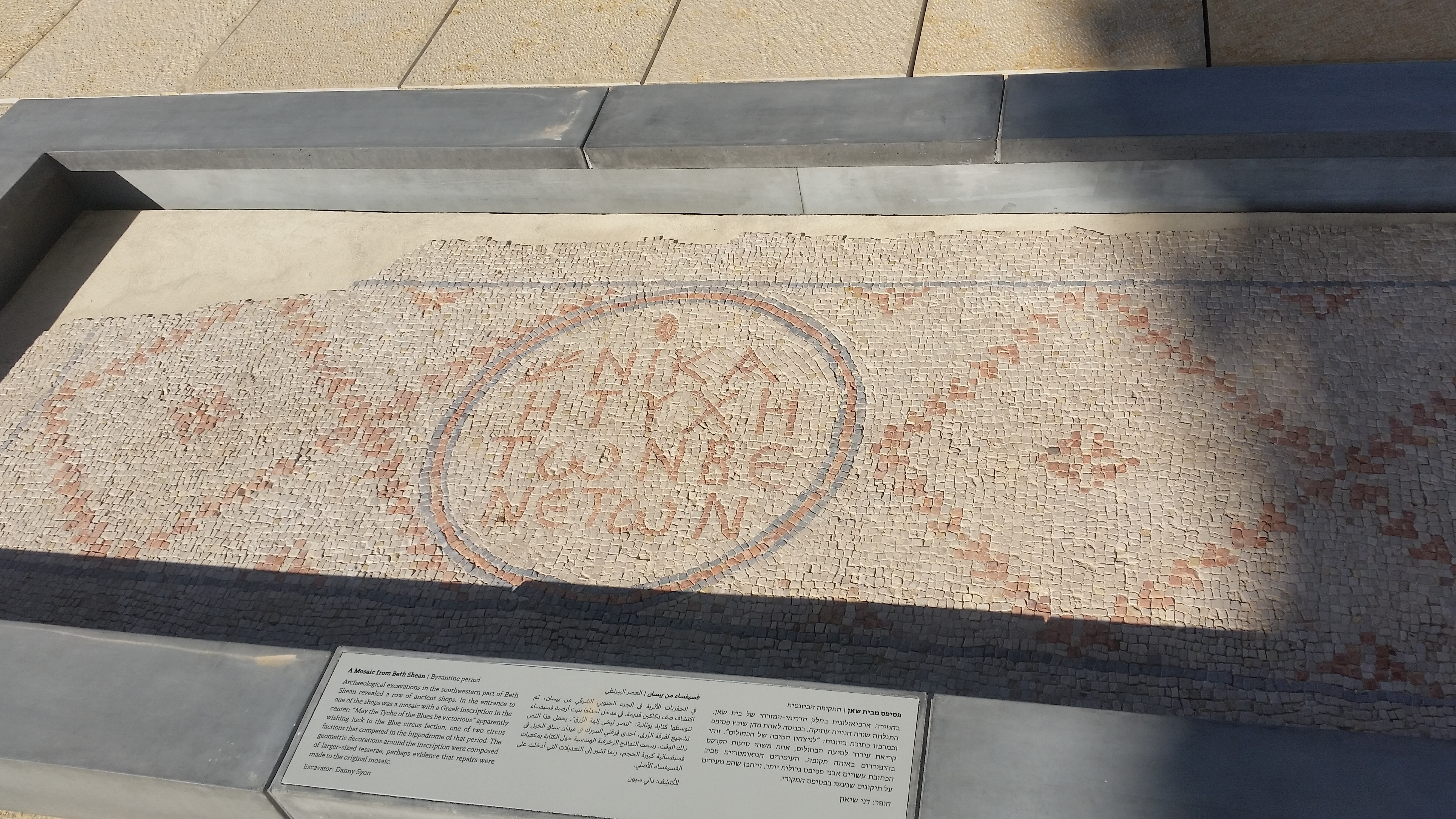 פסיפס מבית שאן שנחפר על ידי דני שיאון ומתוארך לתקופה הביזנטית. בחפירה בחלק הדרומי מזרחי של בית שאן נתגלתה שורת חנויות. בכניסה לאחת מהן שובץ הפסיפס הבא ובמרכזו הכתובת "לנצחון הסיכה של הכחולים" ביוונית. מדובר בקריאת עידוד לסיעת הכחולים, אחת משתי סיעות הקירקס בהיפודרום באותה תקופה. העיטורים מסביב עשויים אבנים גדולות יותר שייתכן שמעידות על תיקונים שנעשו בו.